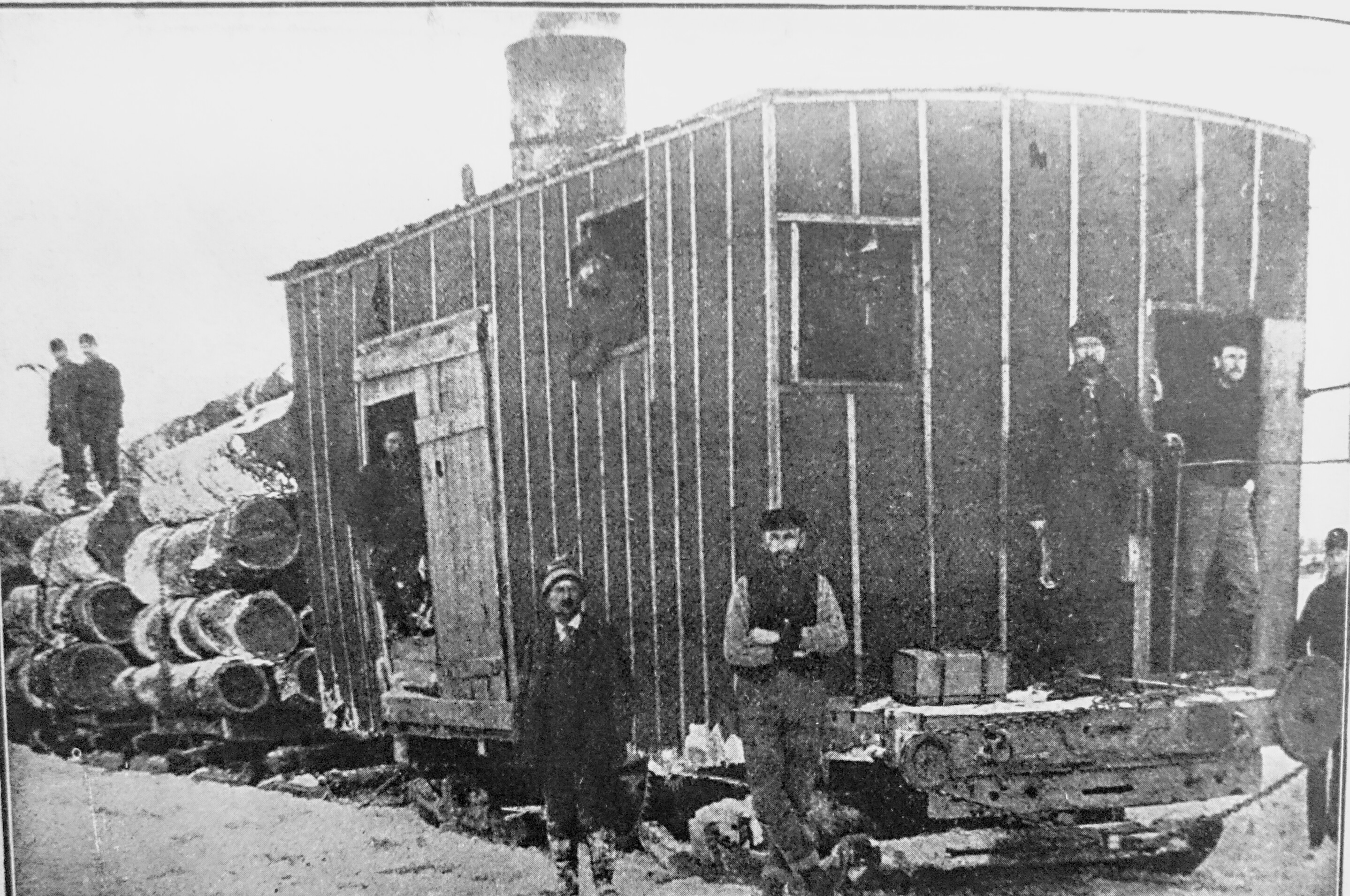 Ze života dělnictva na ruských drahách (1913)